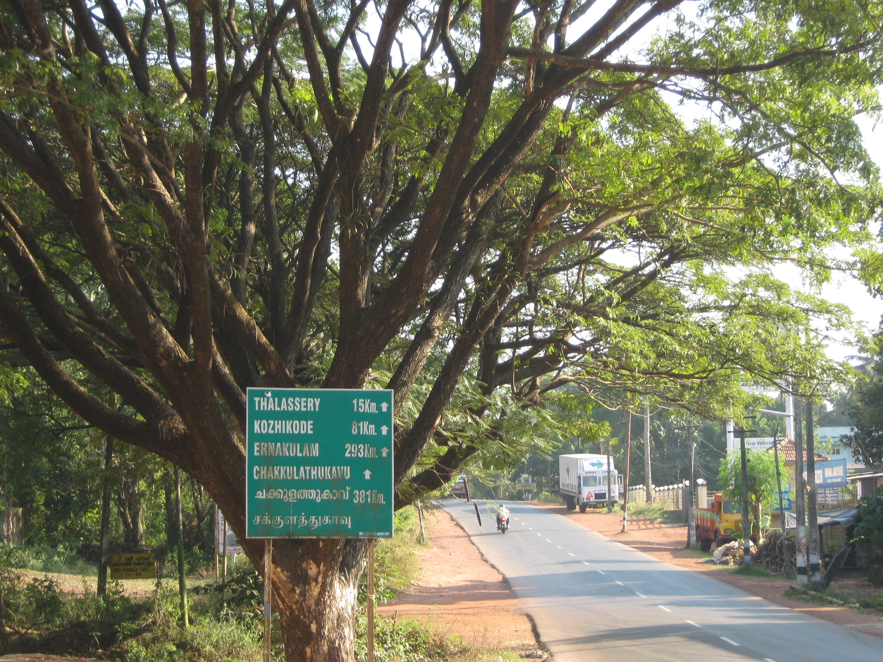 Kannur, Kerala, India.